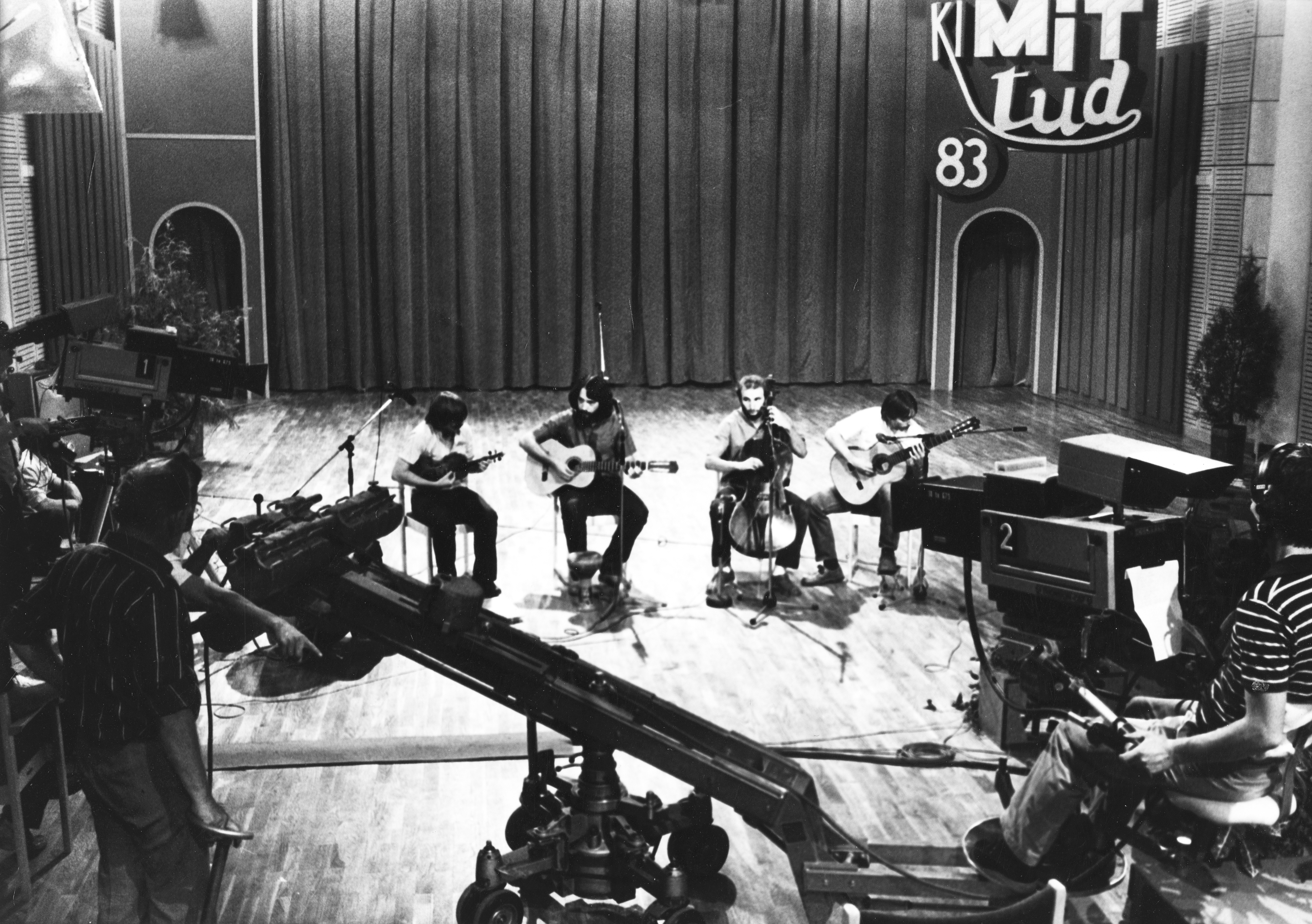 Ki mit tud? Szélkiáltó együttes. Location: Hungary Tags: Hungarian TV Title: Ki mit tud? Szélkiáltó együttes.